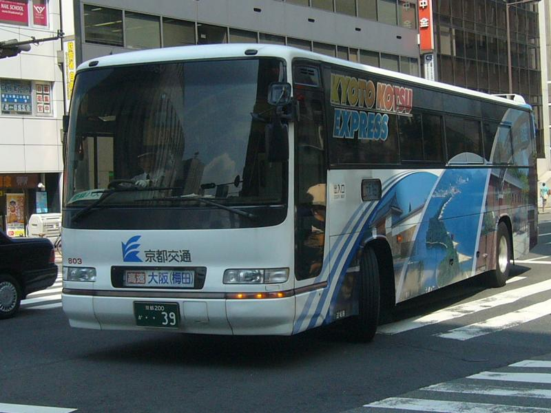 登録番号 京都200か・・39 日本交通所属 車番803 大阪 - 福知山・舞鶴・宮津線用 2007年9月4日 阪急三番街付近にて撮影